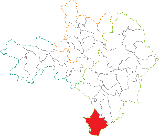 Situation du canton dans le département du Gard (France)